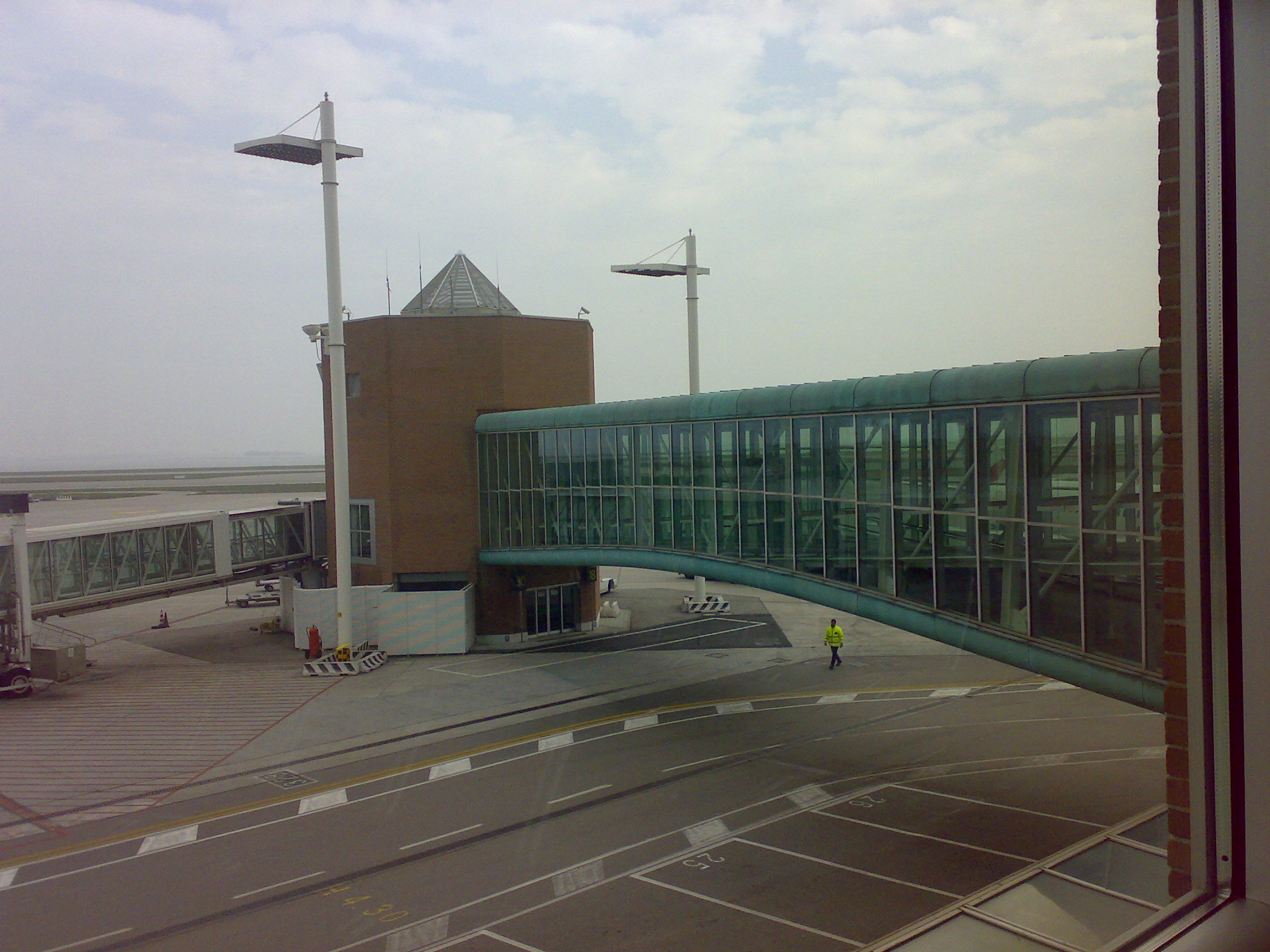 Aeroporto di Venezia, in partenza per la gita a Praga. (foto 2)